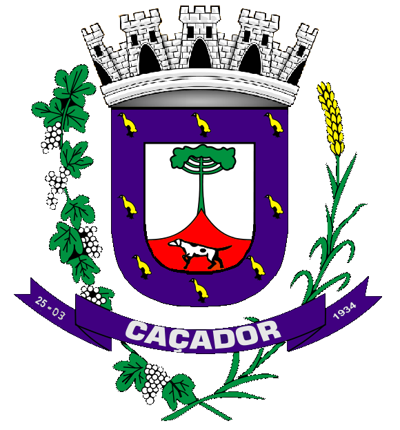 Simulação do brasão de Caçador, com correções respeitando regras da Heráldica (ciência da confecção de brasões). Simulação. Trabalho próprio. Emerson